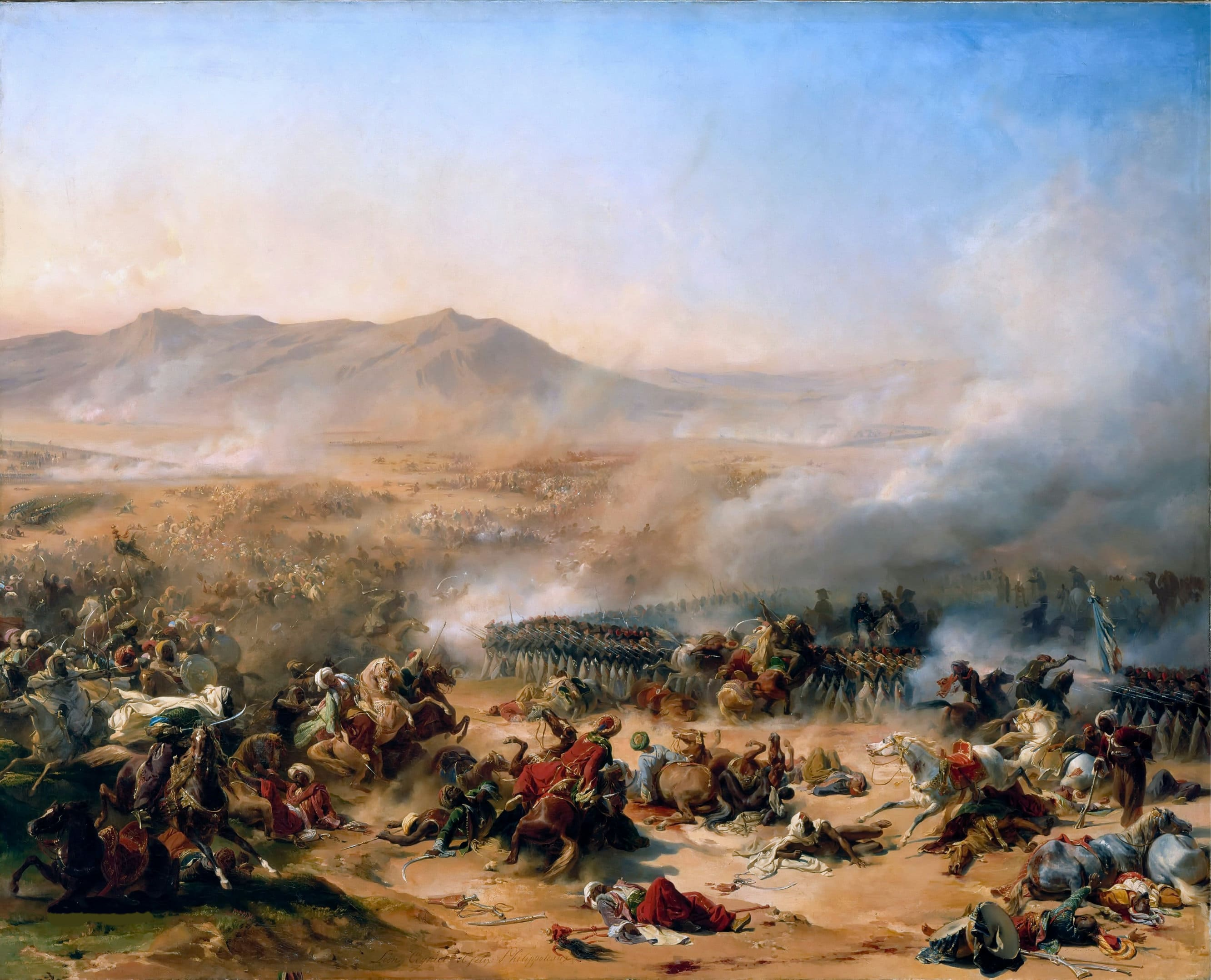 Bataille du Mont Thabor, 16 avril 1799. Campagne d’Égypte de Bonaparte. Huile sur toile. Dimensions : 116 x 146 cm, cadre : 140 x 164 x 8 cm.